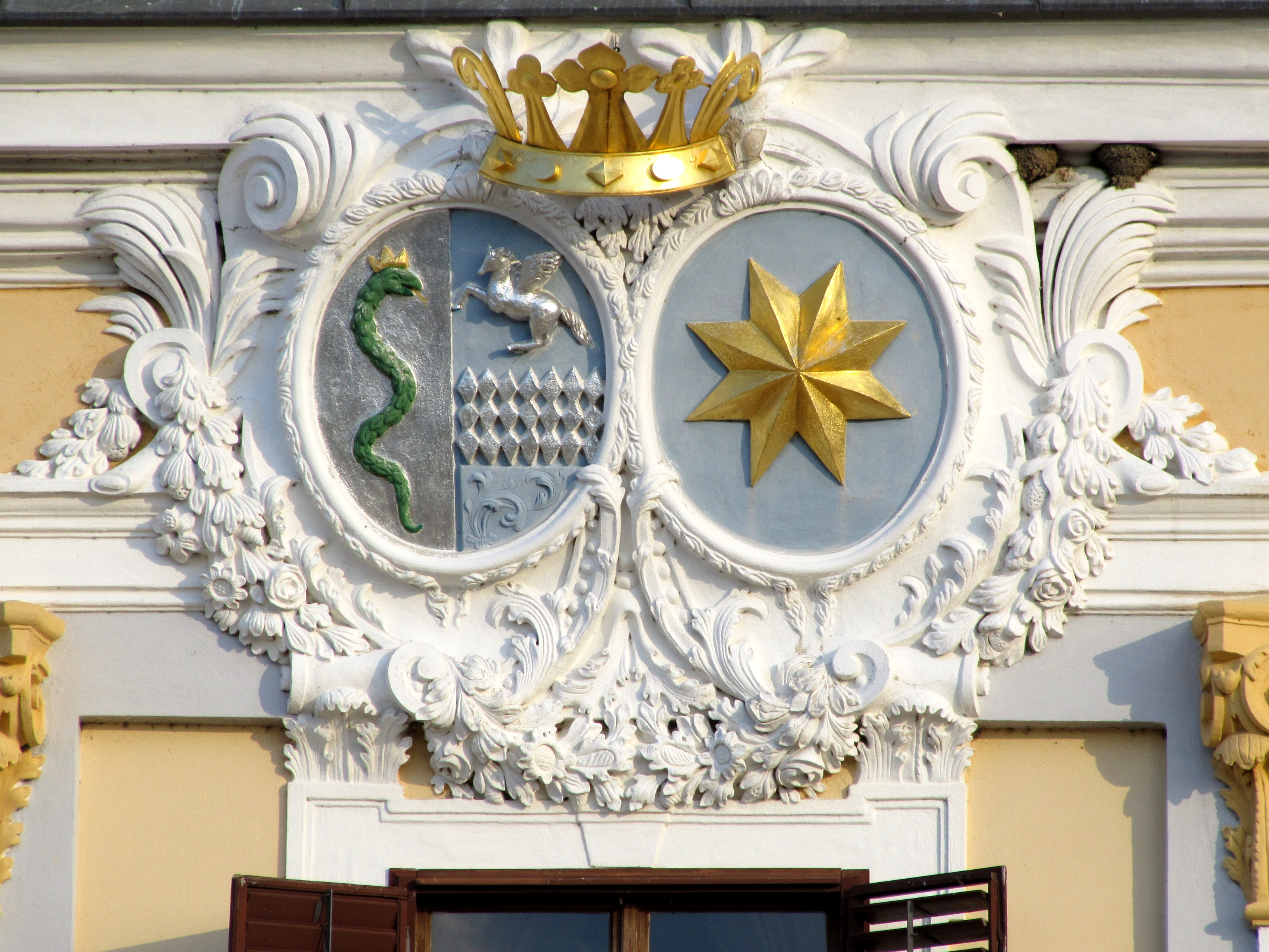 Erb rodu Serenyi na průčelí zámku v Miloticích